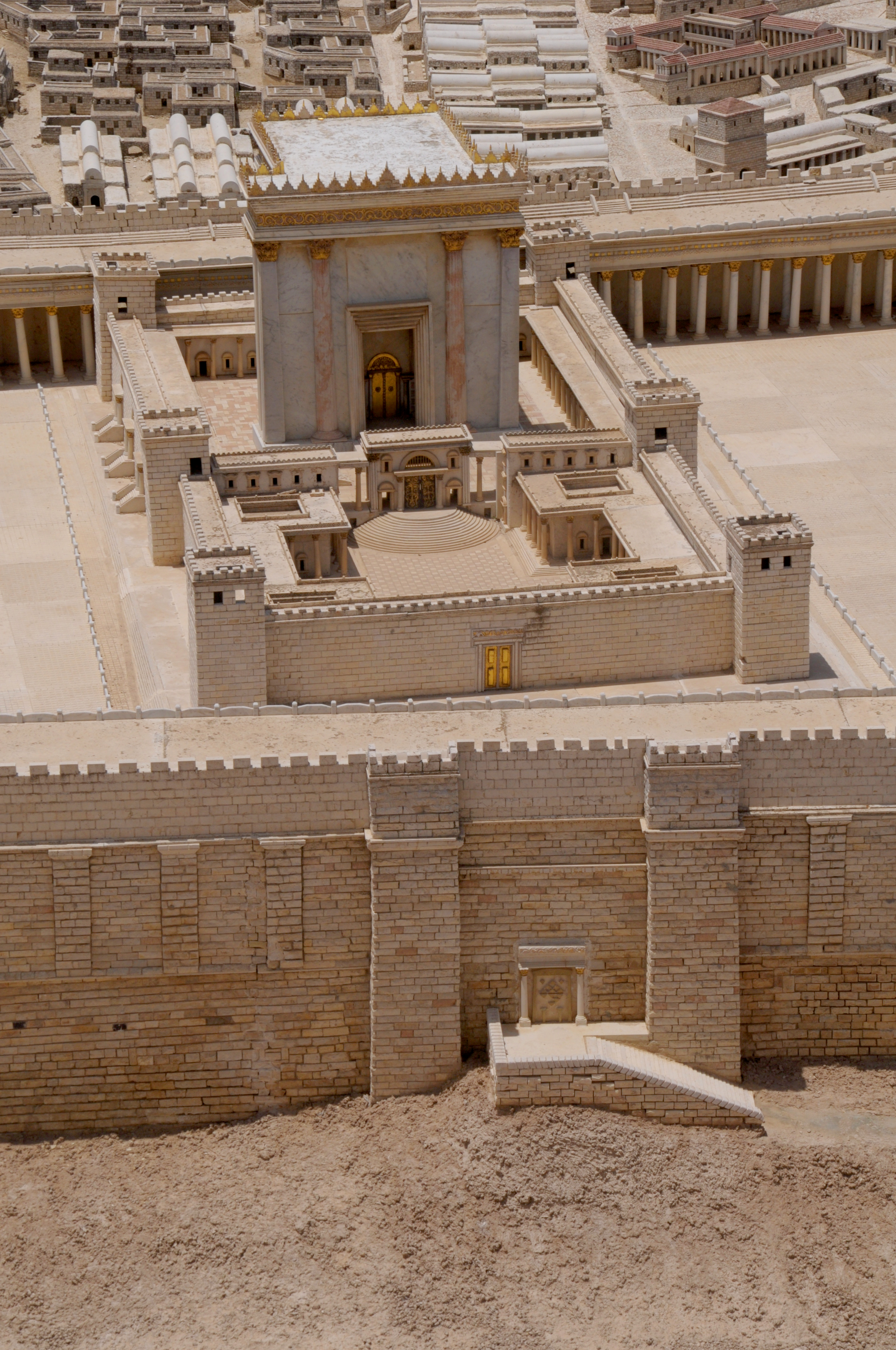 17311 Israel Museum